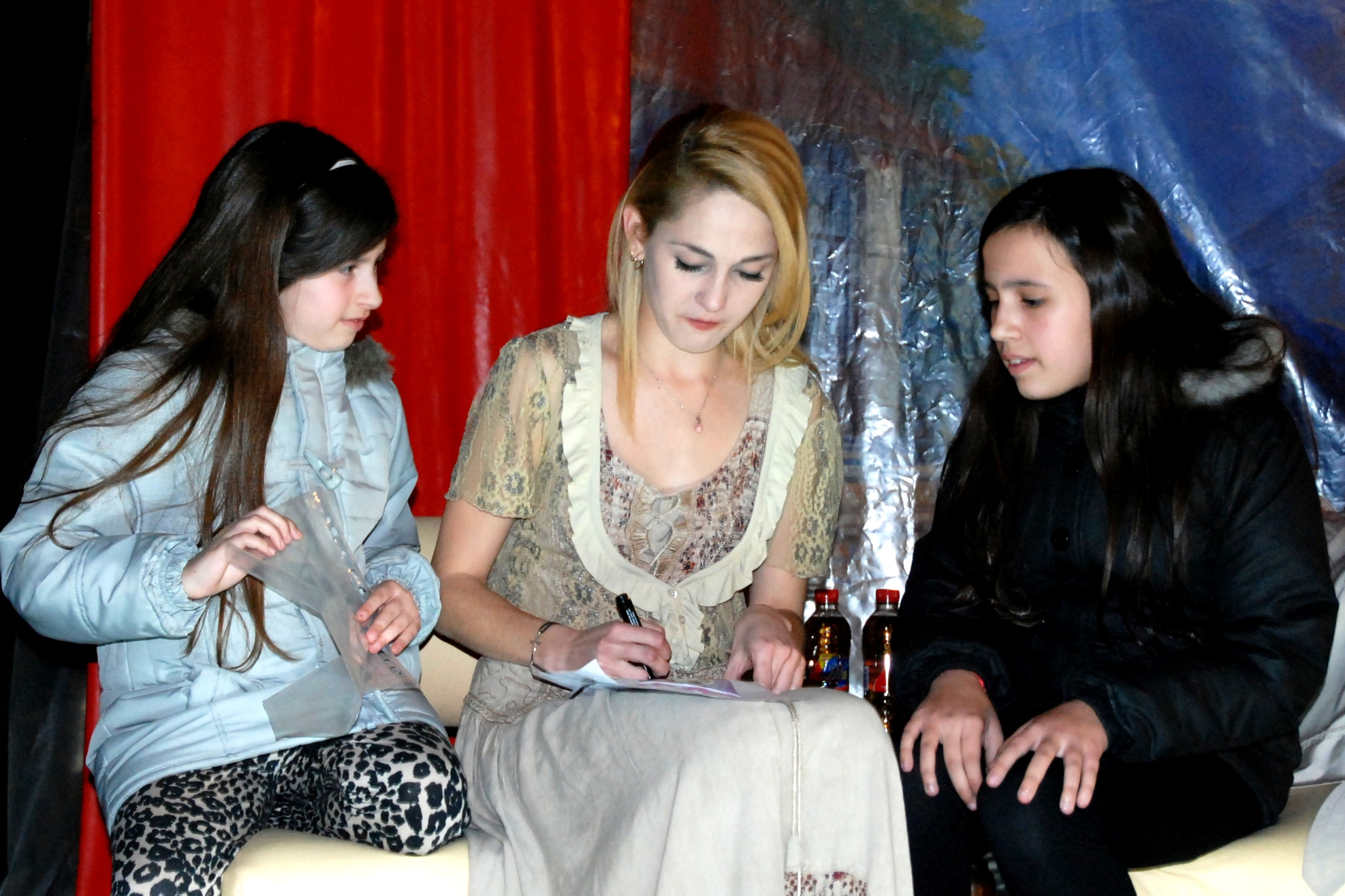 Mercedes Rodríguez Lambre firmando autógrafos en la Sociedad Suiza de Socorros Mutuos de La Plata, en 2013.